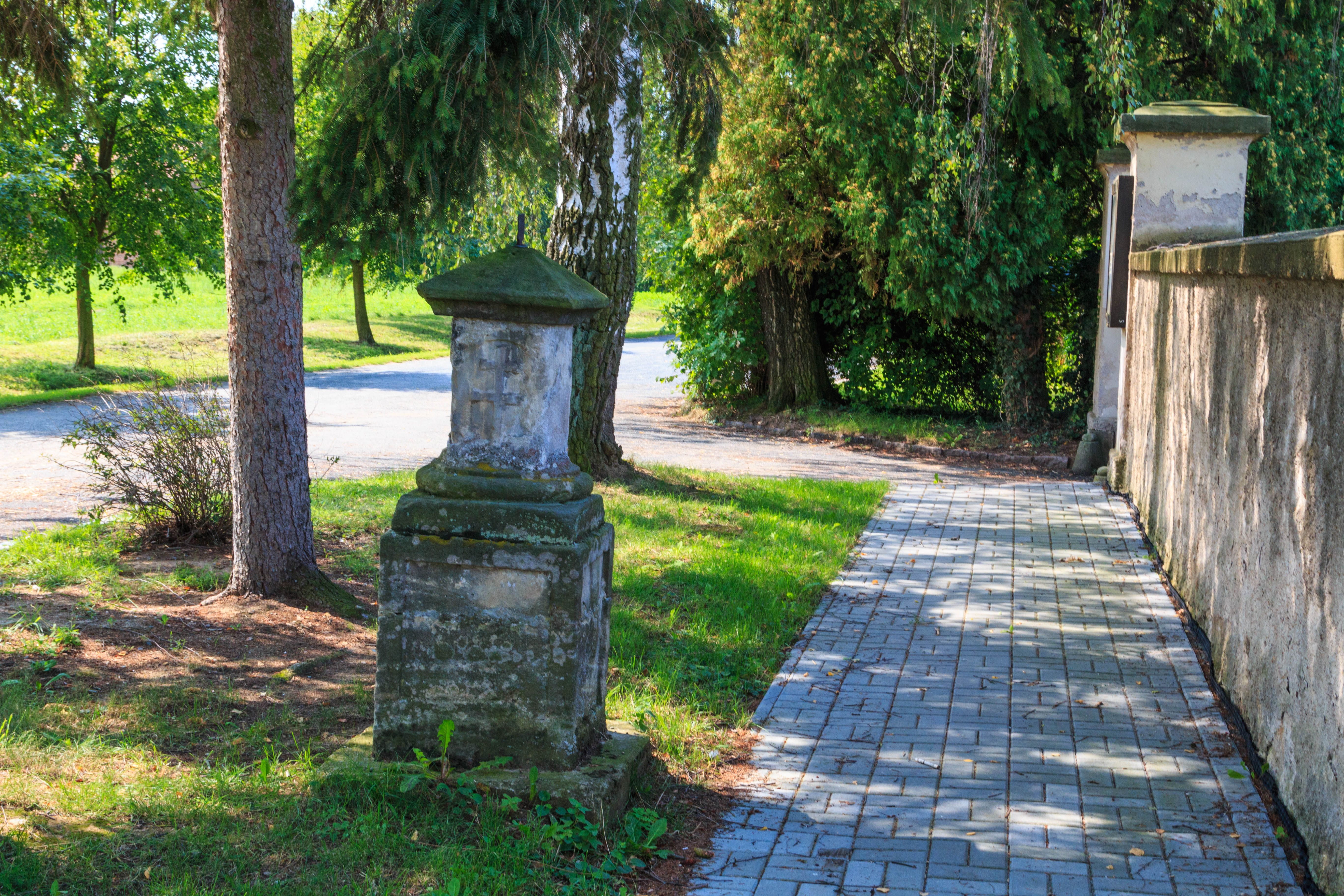 Morový sloup, u hřbitova, Svinčany.